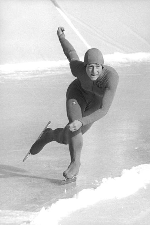 Christa Rothenburger ADN-ZB Mittelstädt 1.3.81 Berlin: DDR-Mehrkampfmeisterschaften im Eisschnellauf- Über 1000m der Frauen sicherte sich Christa Rothanburger vom SC Einheit Dresden - hier bei einem früheren Lauf - mit 1:28,52 den ersten Platz.